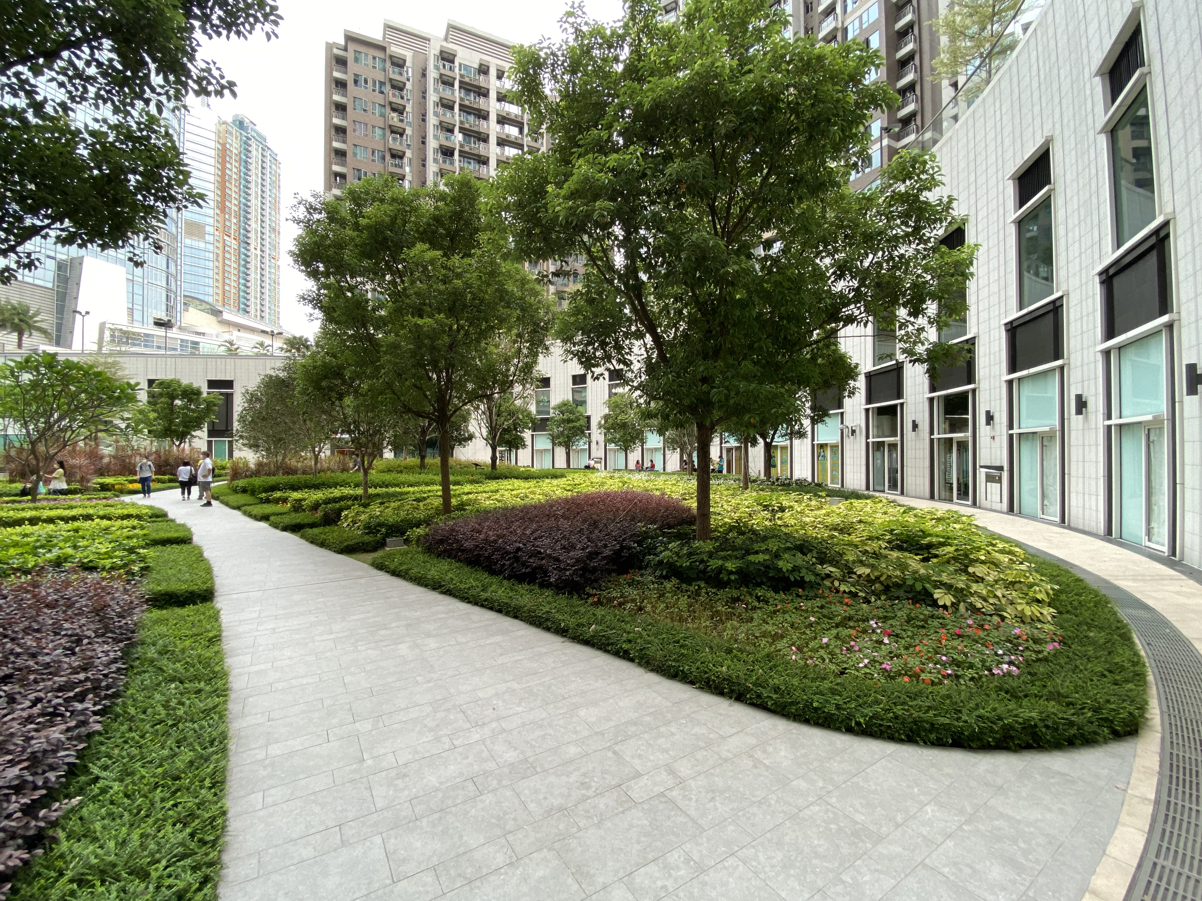 Nina Mall II Level 1